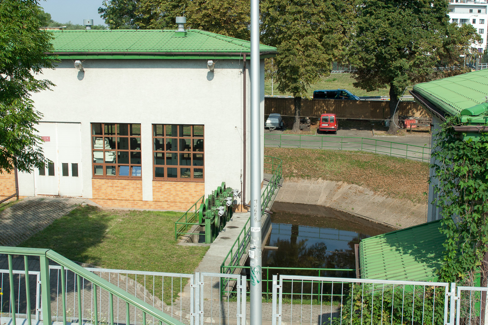 Pompownia (przepompownia) Bluszcze w Wraszawie. Widok z chodnika Trasy Siekierkowskiej. Kanał Nowa Ulga płynie od prawej do lewej.